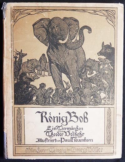 Titel des Urwaldmärchens von Theodor Volbehr König Bob (1906) mit Illustrationen des Tiermalers Paul Neuenborn (1866–1913).